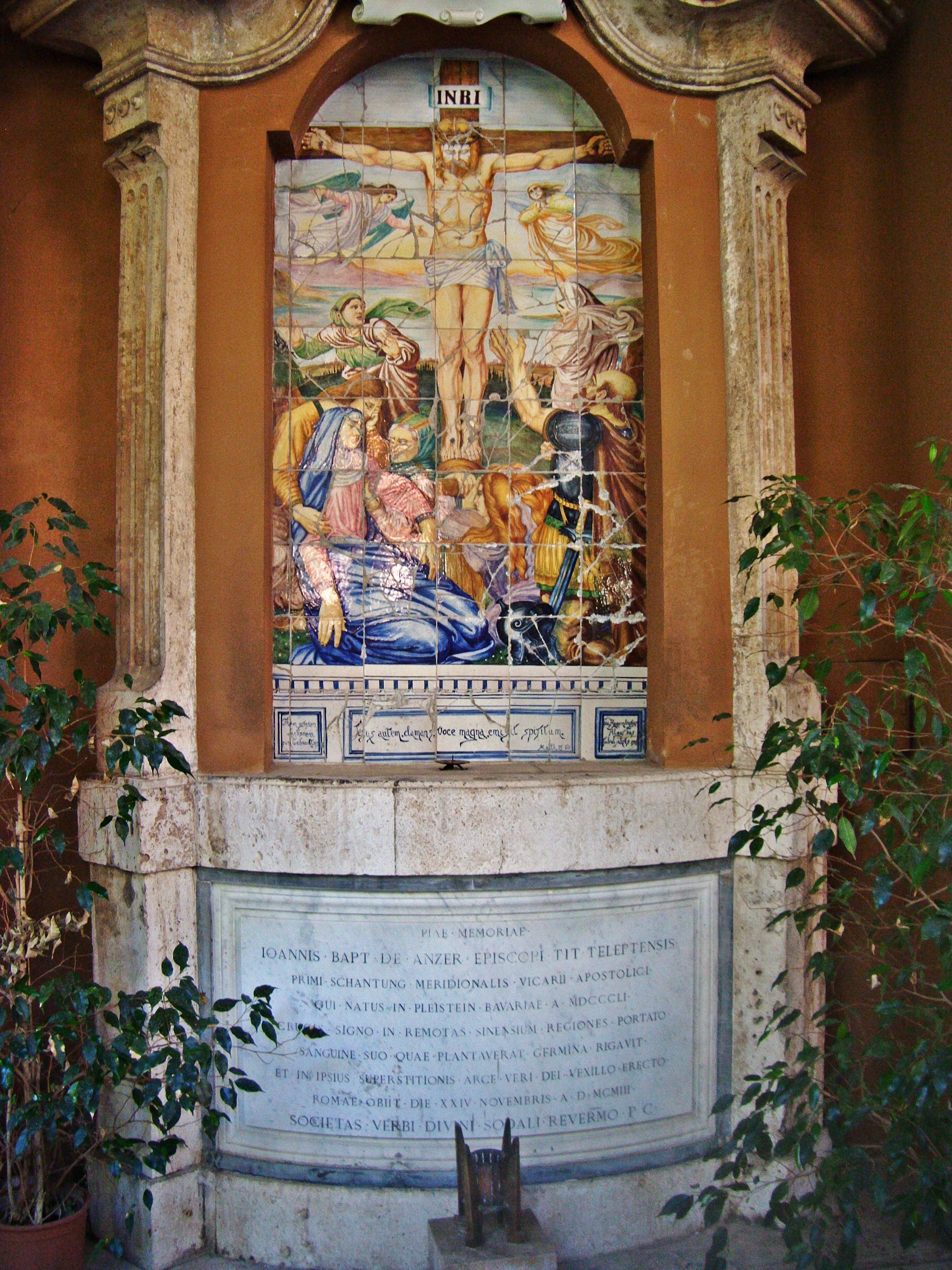 Grab von Bischof Johann Baptist von Anzer (1851-1903), Campo Santo Teutonico, Rom